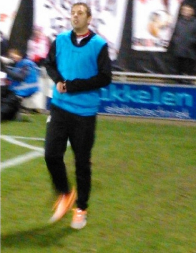 Oebele Schokker in 2014.